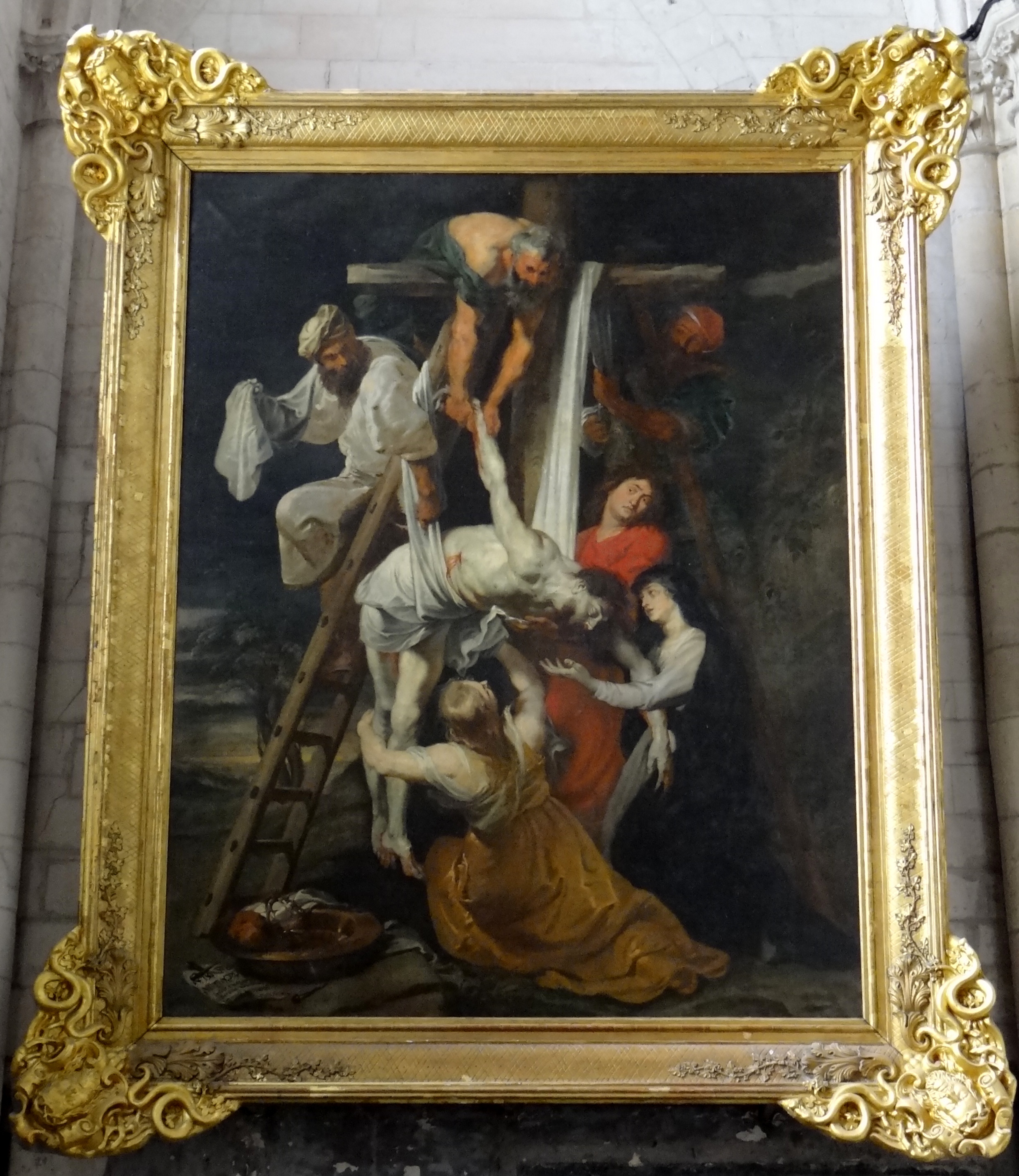 Descente de croixtitle QS:P1476,fr:"Descente de croix" label QS:Lfr,"Descente de croix"